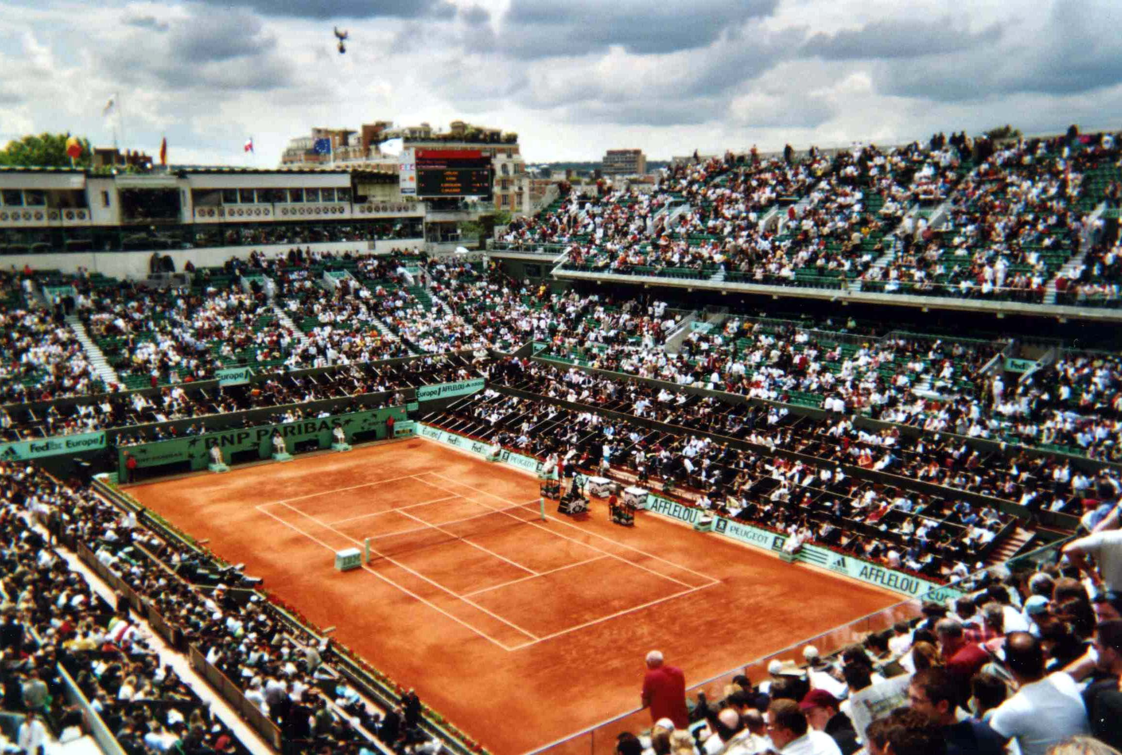 Le court central Philippe Chatrier au Stade Roland Garros (Paris, France)